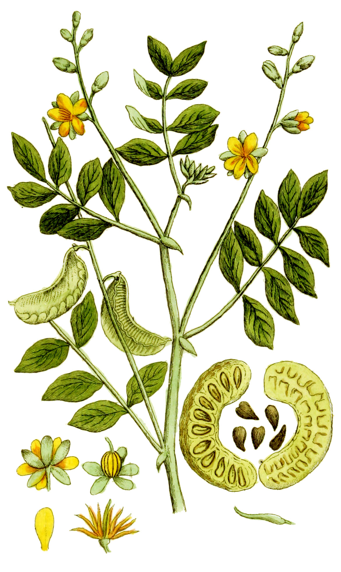 Senna alexandrina (= Cassia senna). Tab. 80